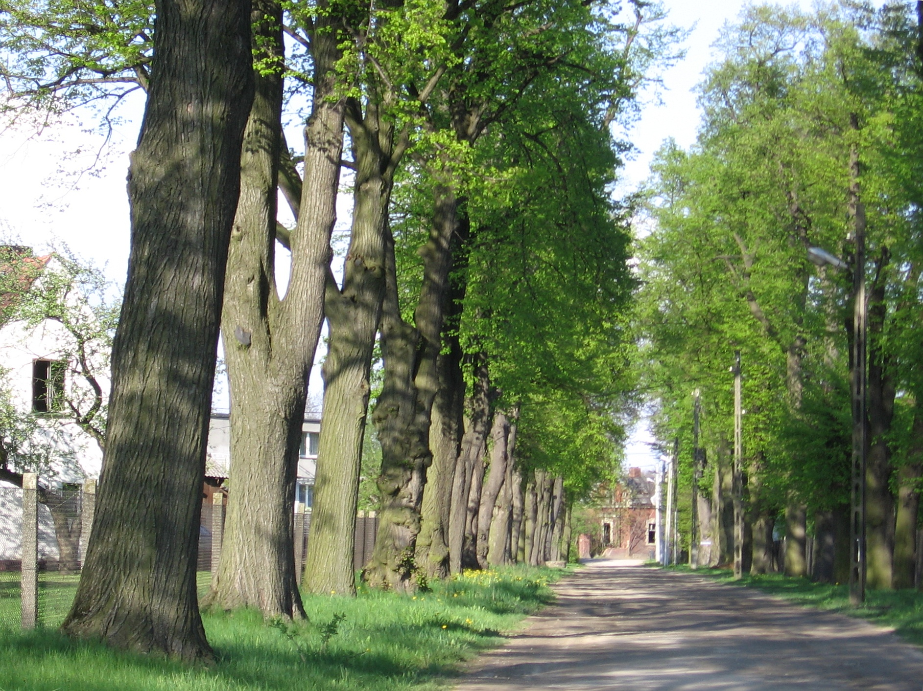 village Ligota Piękna near Wrocław - lime alley